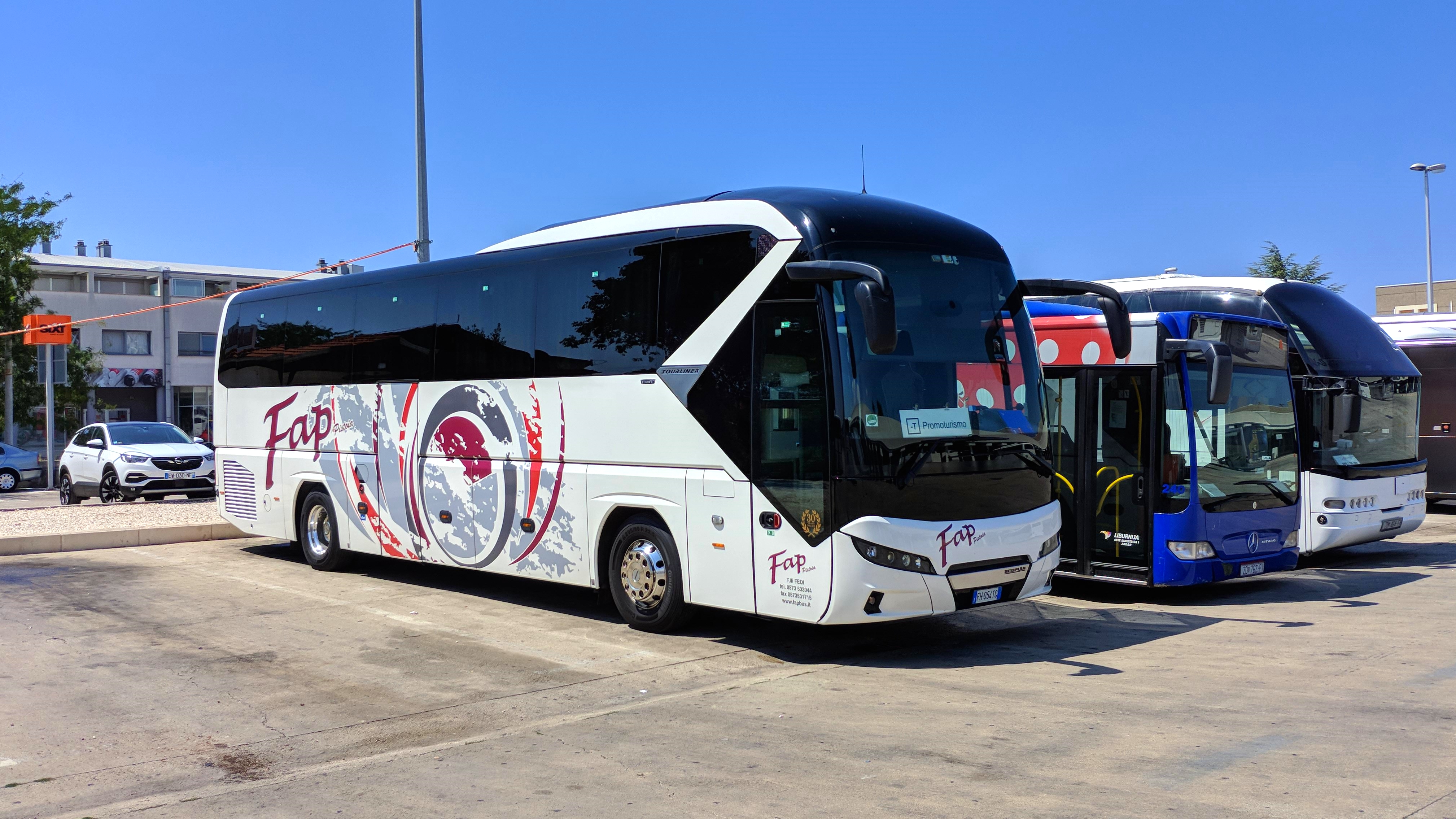 Ein Neoplan Tourliner der italienischen Fap Bus steht am Autobusni Kolodvor in Zadar, Kroatien neben einem Mercedes-Benz Citaro Facelift der Liburnija Zadar und einem Neoplan Starliner von Antonio Tours.